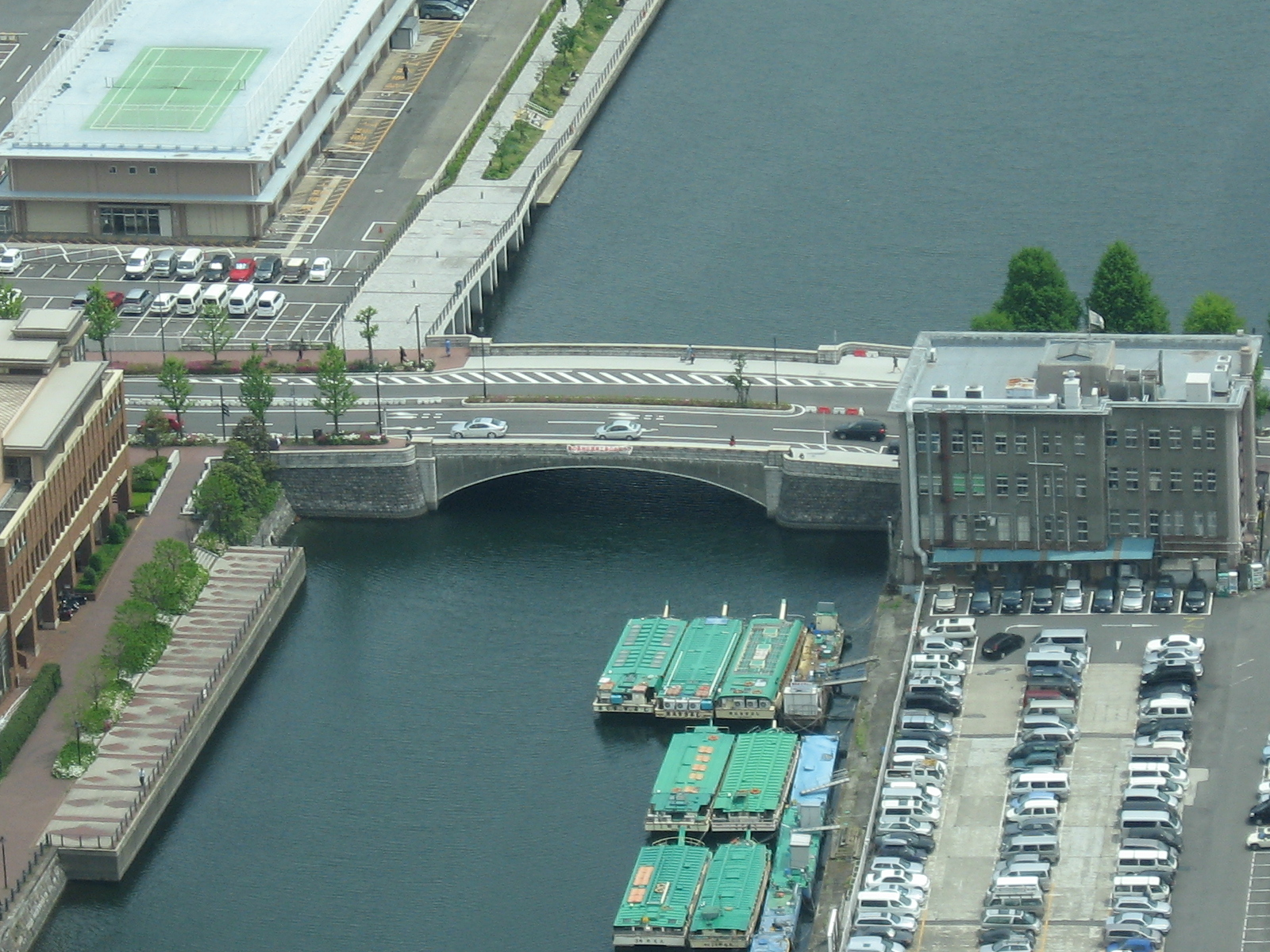 横浜ランドマークタワーより万国橋